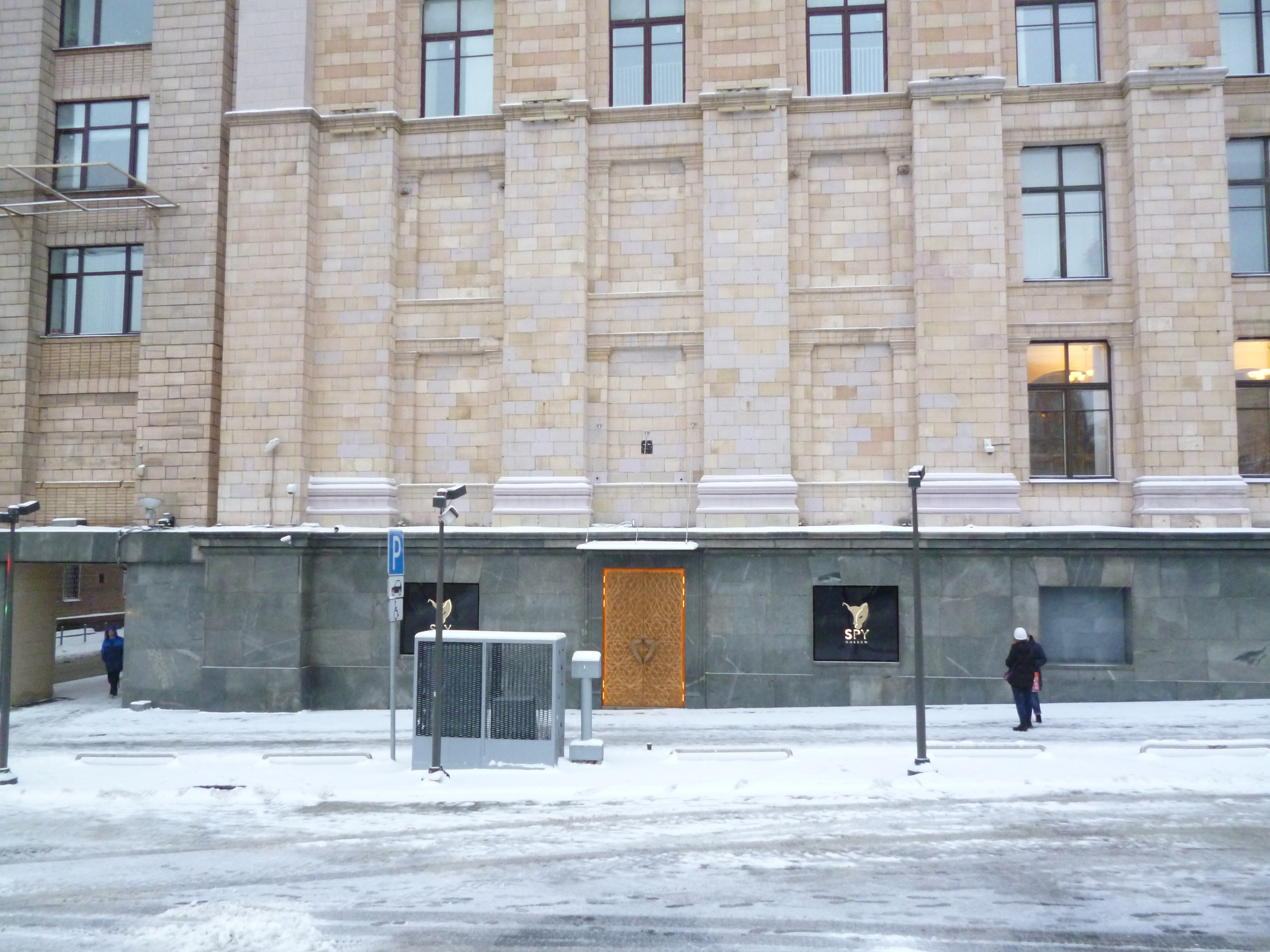 Бывший кинотеатр "Дом Ханжонкова"